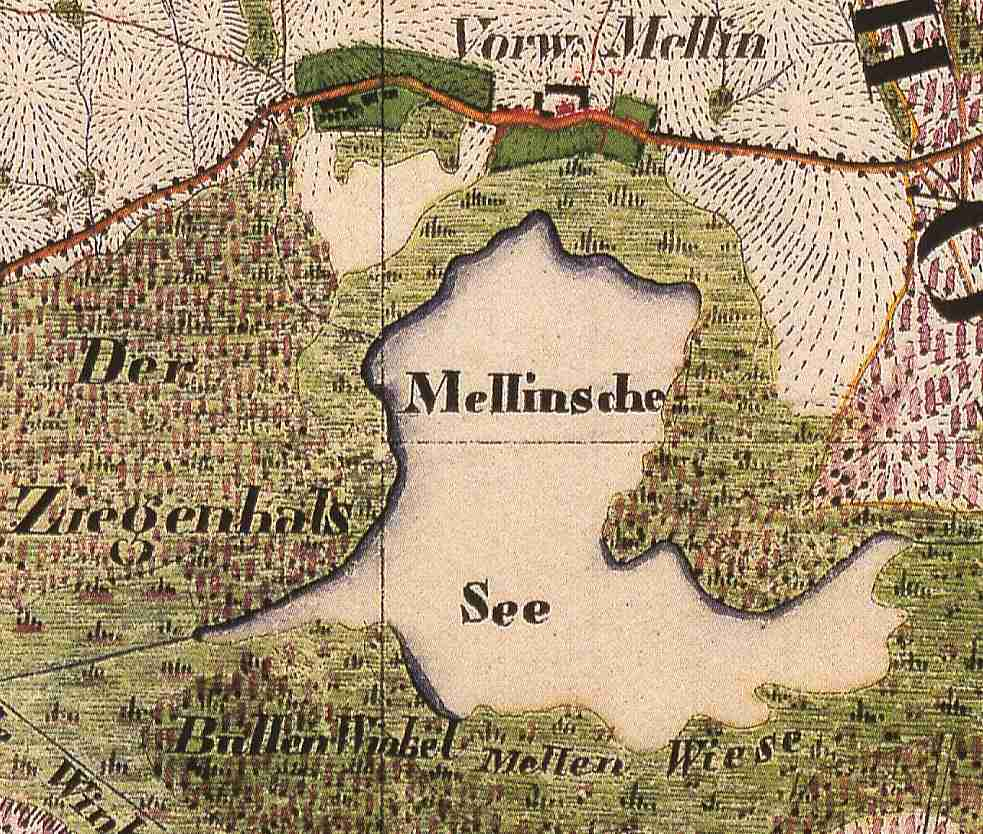 Mellin, abgegangene Siedlung bei Parlow-Glambeck, Ortsteil der Gemeinde Friedrichswalde, Landkreis Barnim, Brandenburg, Deutschland, Ausschnitt aus dem Urmesstischblatt 2948 Friedrichswalde von 1826